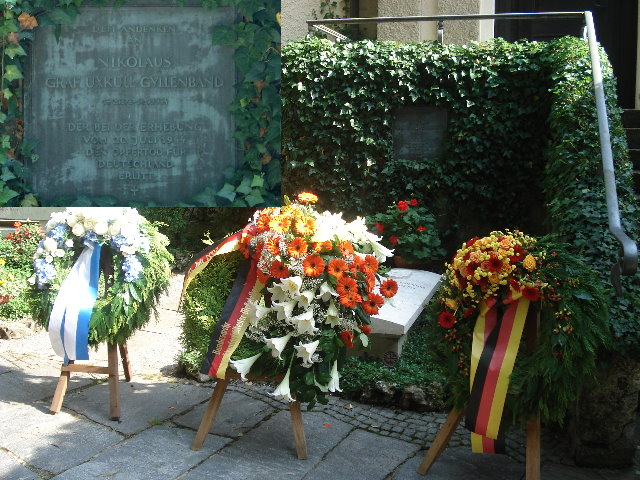 Epitaph Nikolaus Graf von Üxküll-Gyllenband in Albstadt-Lautlingen (neben der Stauffenberg-Gedächtniskapelle), am 20. Juli 2007